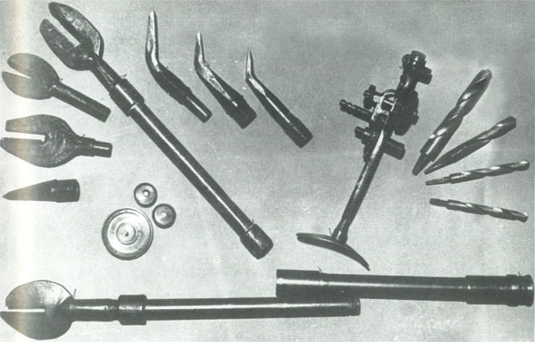 Орудия взлома "шниферов", специалистов по вскрытию сейфов. "Шнифера"-"килечники" назывались так потому, что сейф, "откупоренный" этими инструментами, выглядел как открытая банка с кильками. 1924 г.